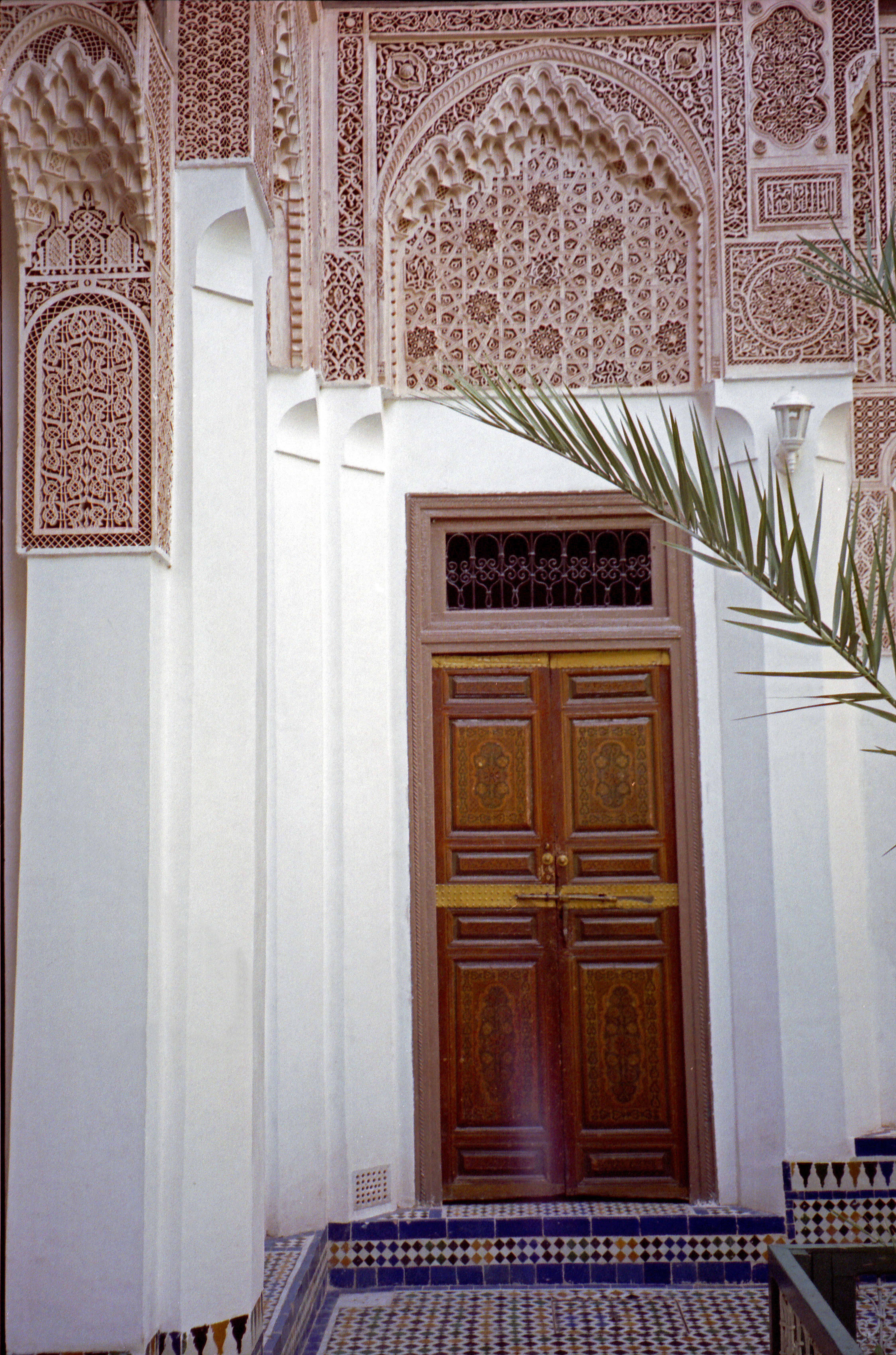 Morocco-65